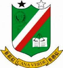 Brasão de Armas do município de Cana Verde, Minas Gerais, Brasil.